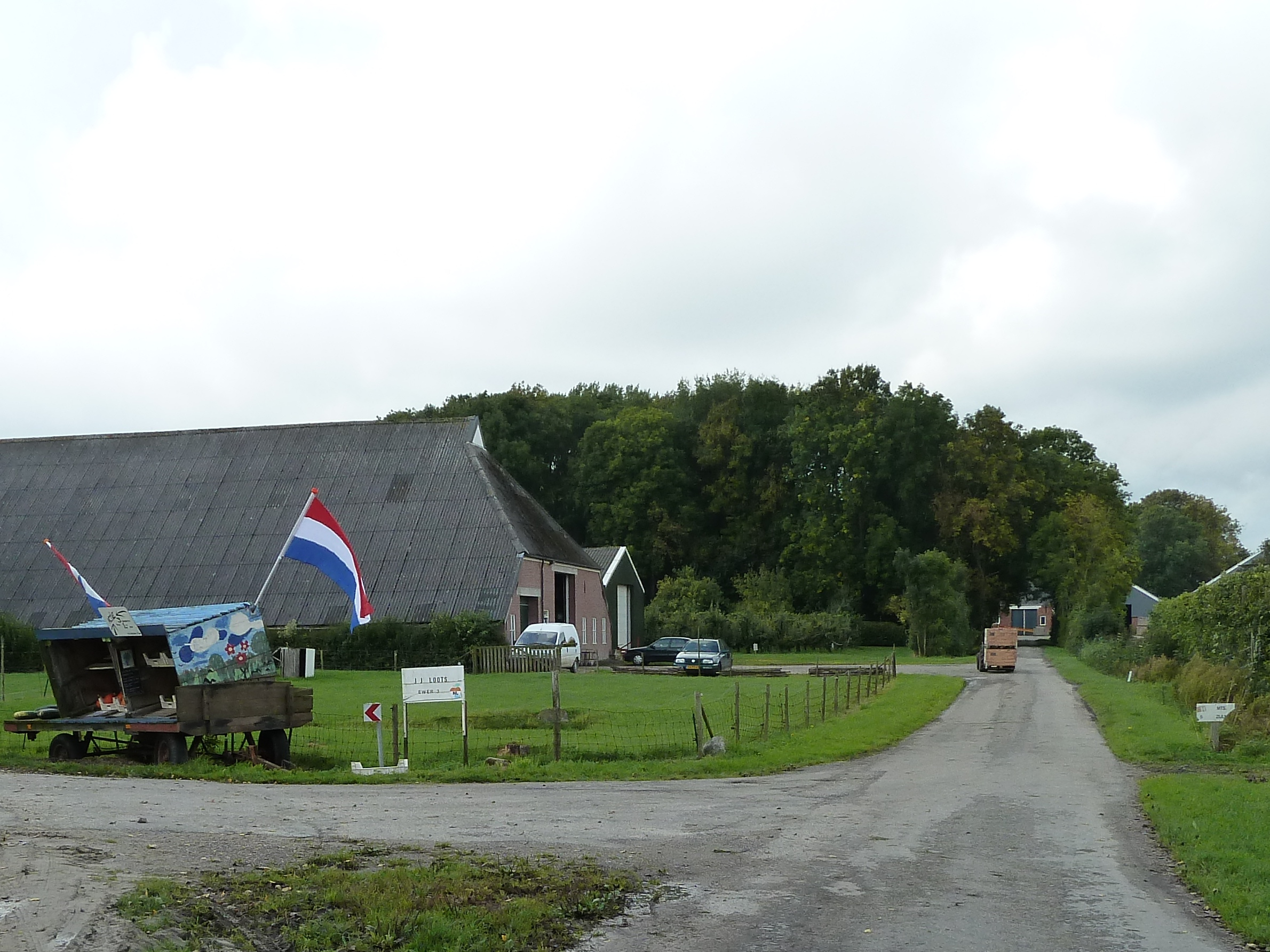 Ingang naar Ewer (Zuurdijk, De Marne) vanaf het fruitbedrijf. Rechts de appelboomgaard.